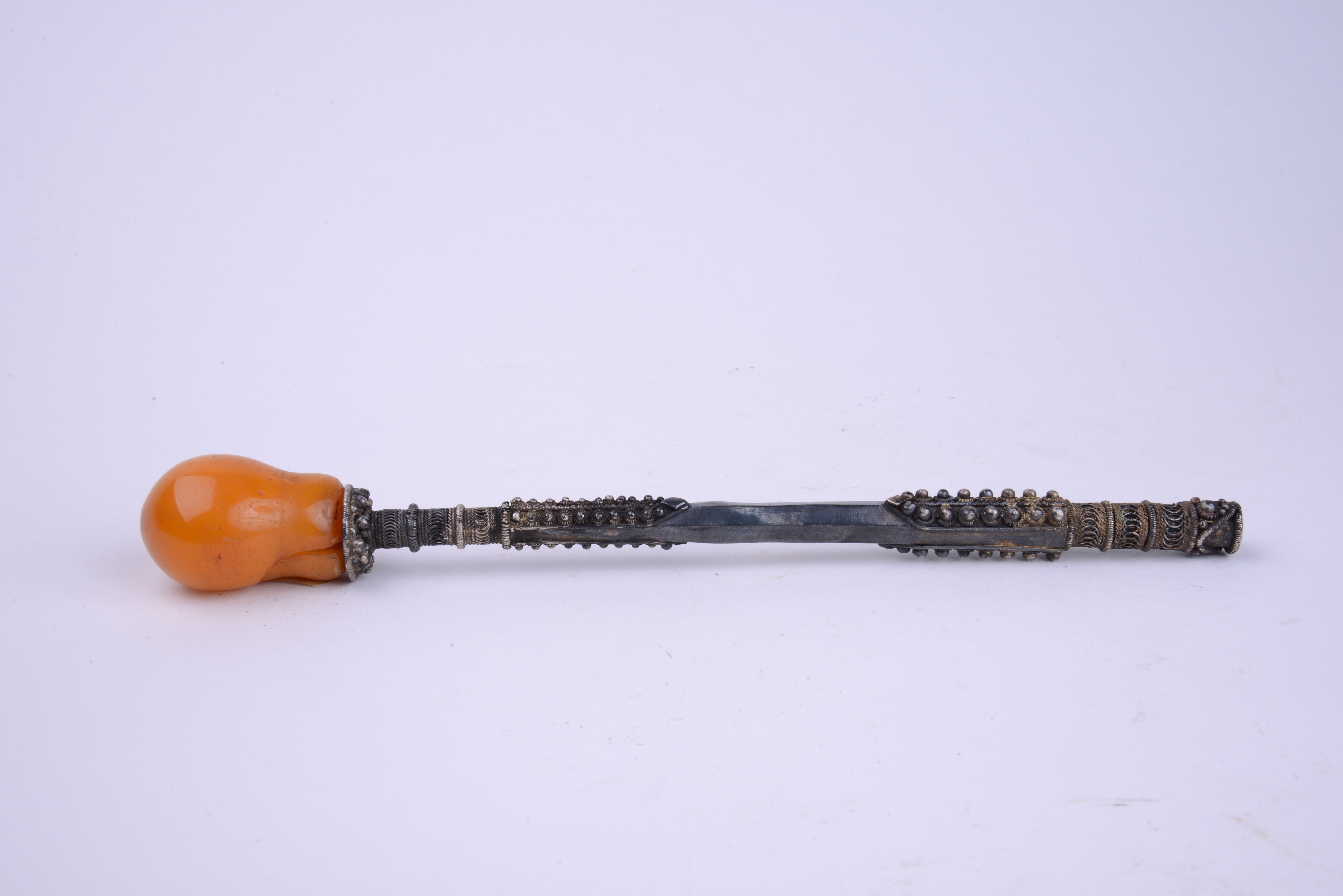 Srpski (latinica): Mištikala čibuk iz XX veka. Otkup od S. Eminovića iz Svirca, 1962. godine. Predstavlja ručni rad, zanatsko-kujundžijske izrade. Izrađena je od srebra, bogato ukrašena i služila je za pušenje. Sastoji se iz 2 dela: jedan je izduženi valjkasti od srebra dok je drugi od ćilibara, žute boje i loptastog oblika kroz koji se uvlačio dim. Deo je zbirke primenjene umetnosti.